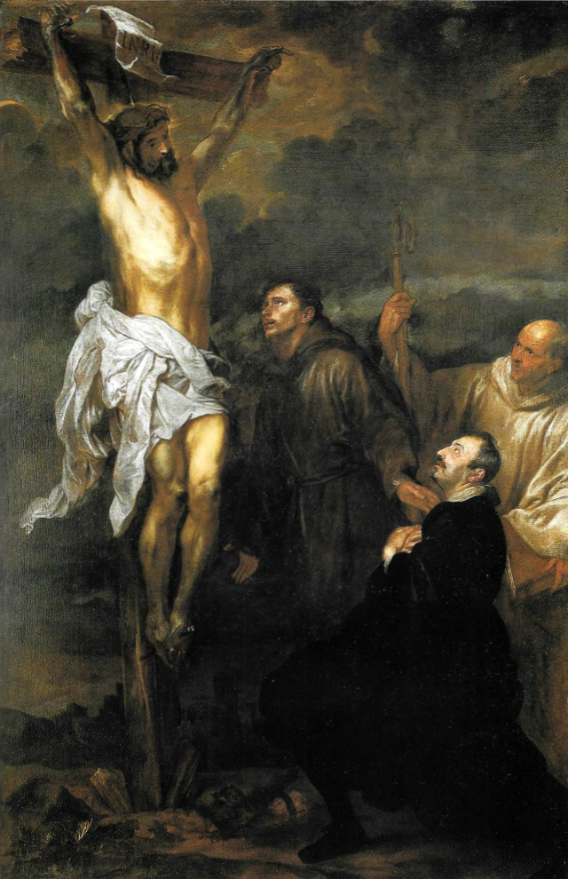 Crucifixion